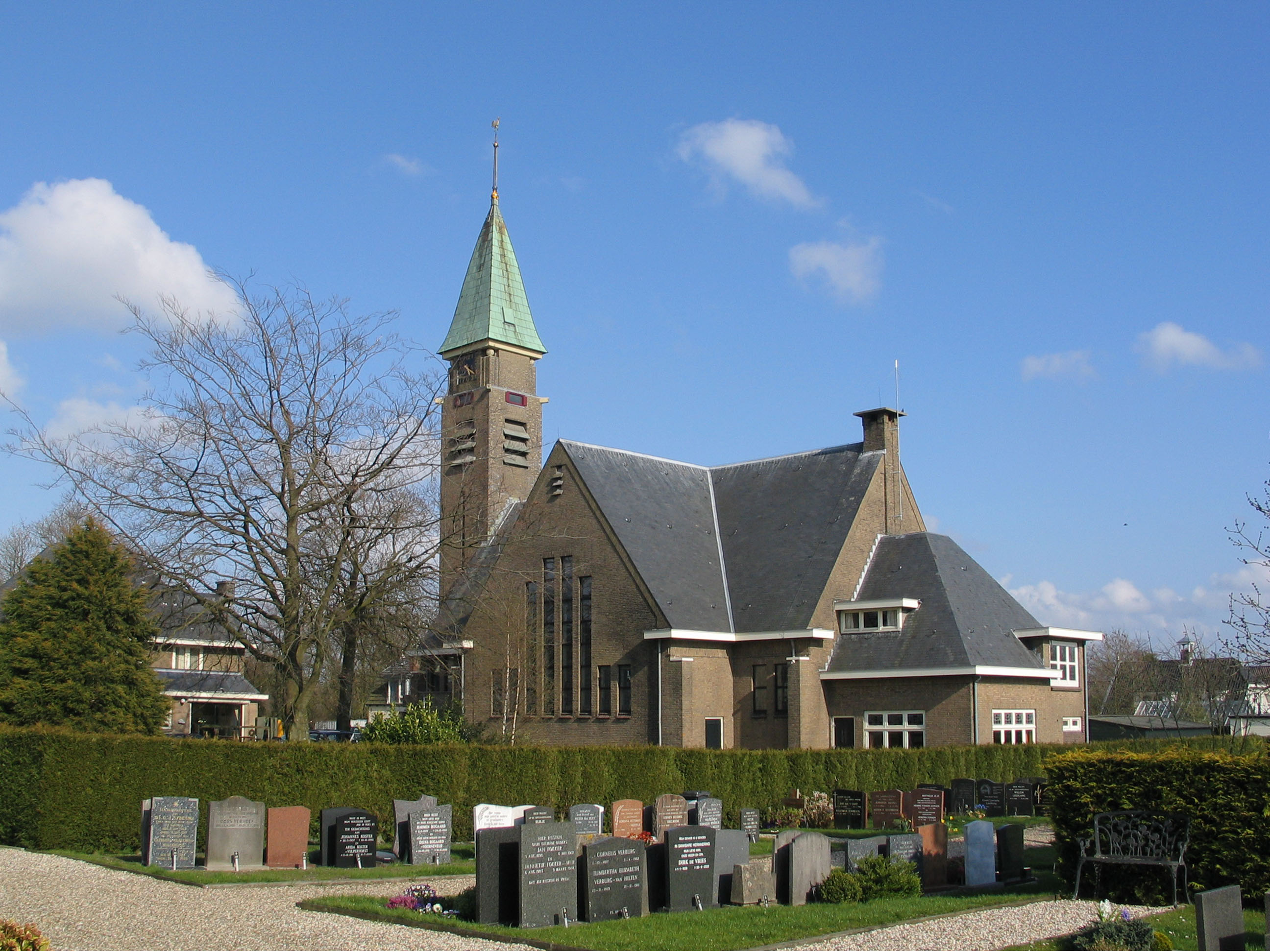 Kruiskerk uit 1930. Architect B. Plooij. Amsterdamse School invloeden. Vergelijk deze kerk met die in de Amstelhoek.